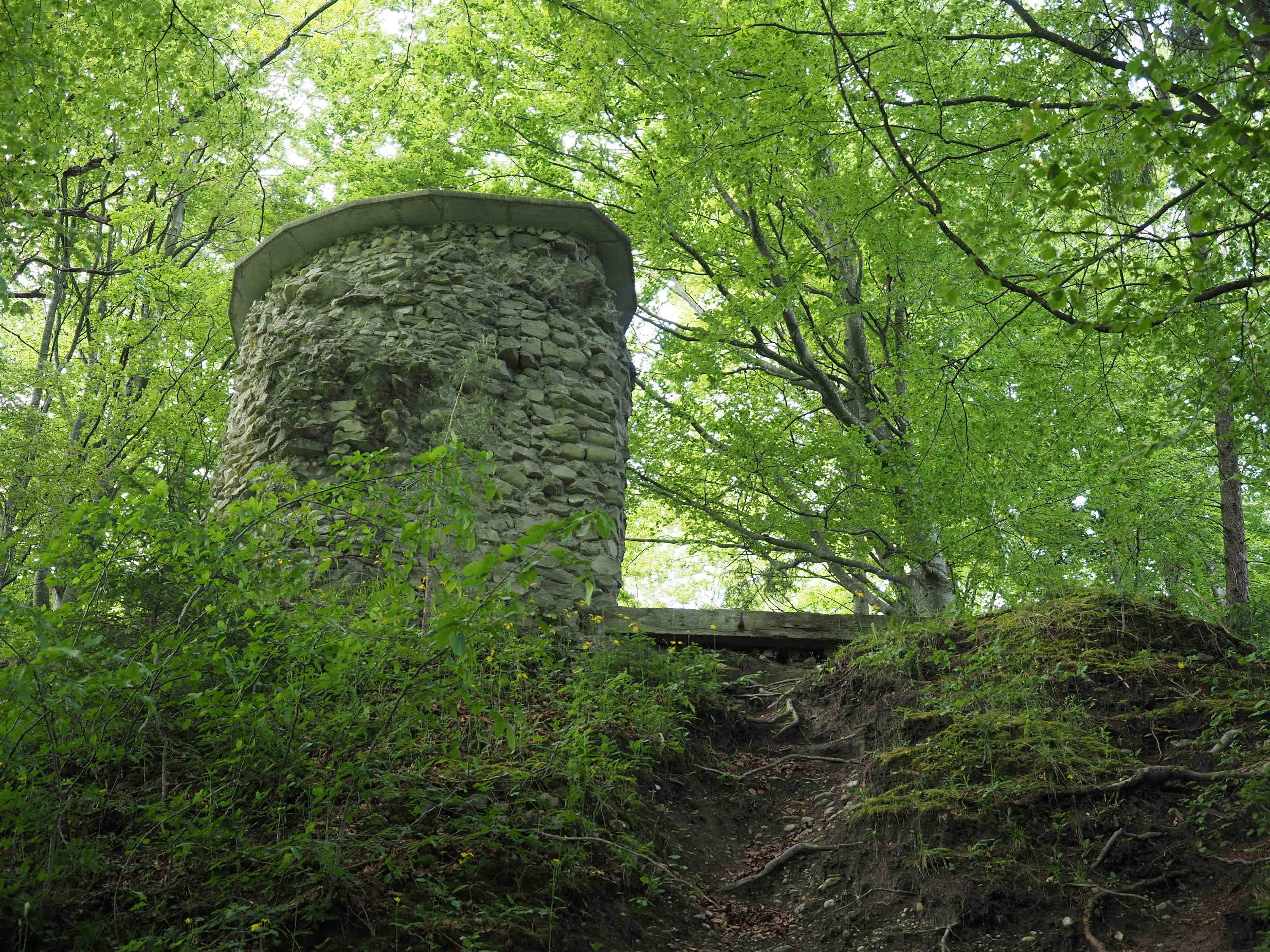 Ruine Wartenstein - Überreste Turm